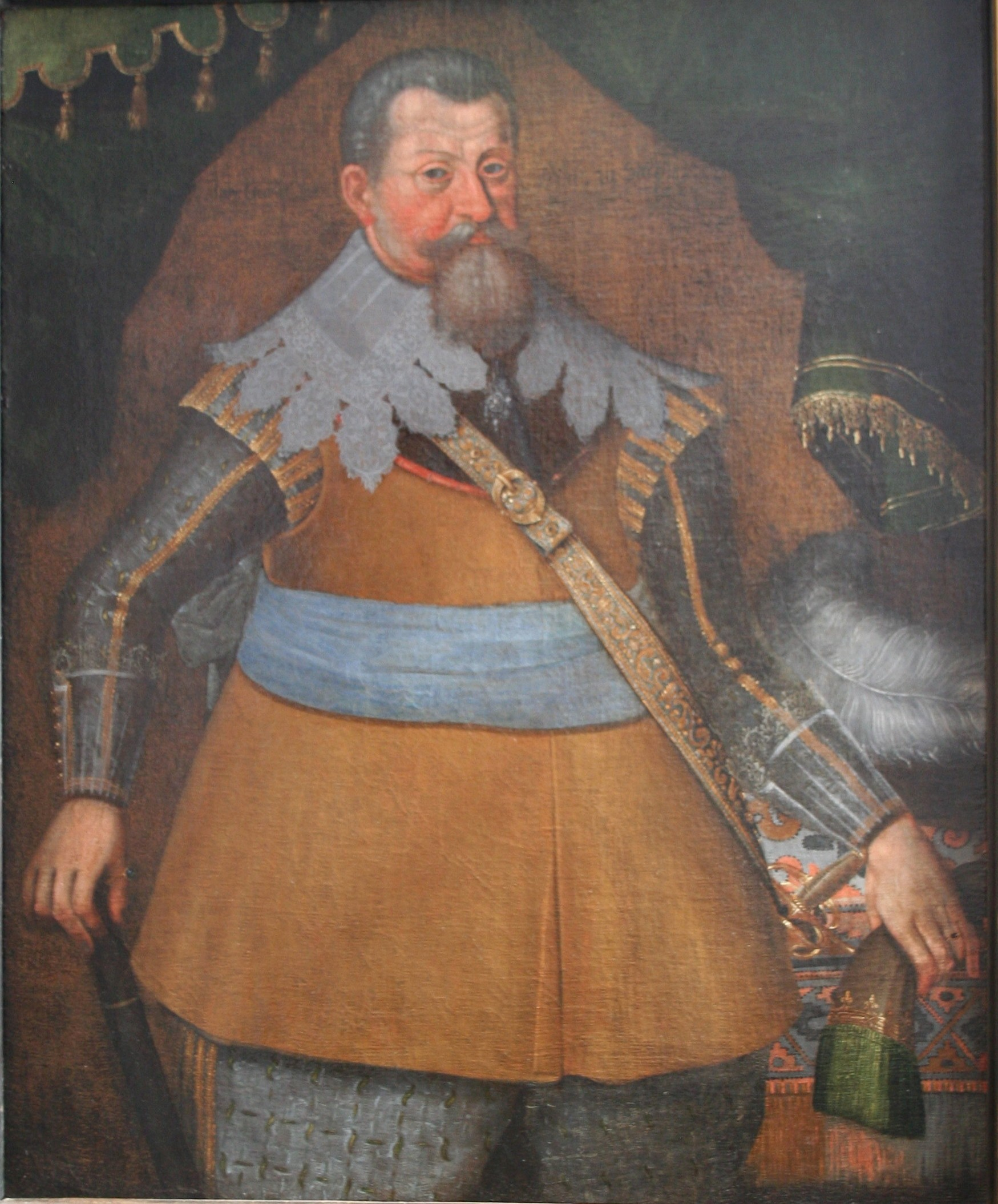 Johann Georg I. (Sachsen). 1637, Öl auf Leinwand, 102 x 126 cm, Museum Bautzen